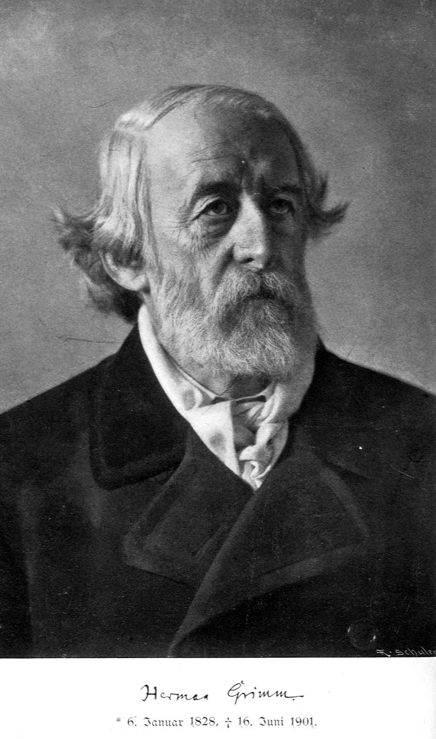 Herman Grimm, German Writer